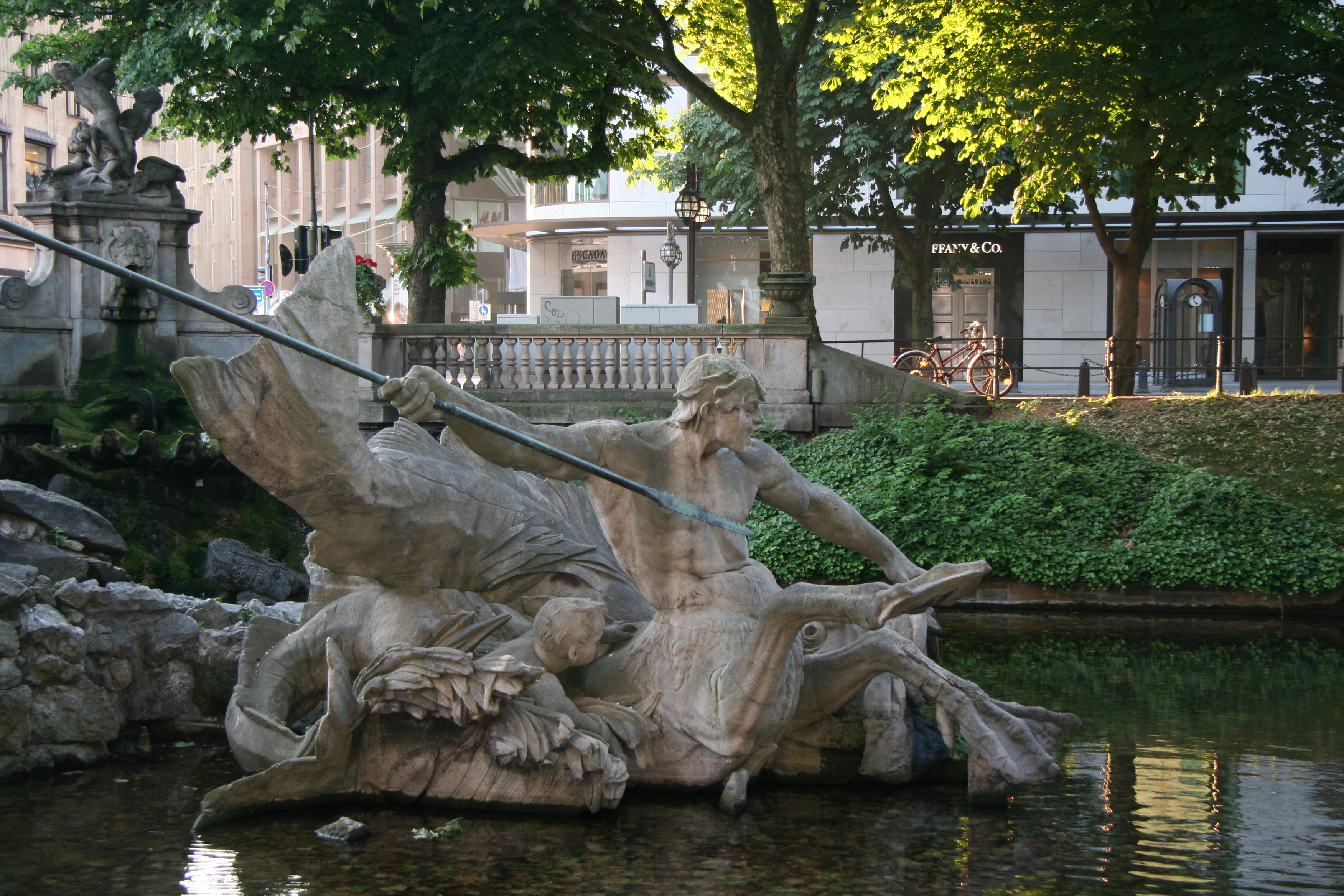 Der Tritonenbrunnen an Königsallee in Düsseldorf ziert das nördliche Ende des Prachtboulevards.